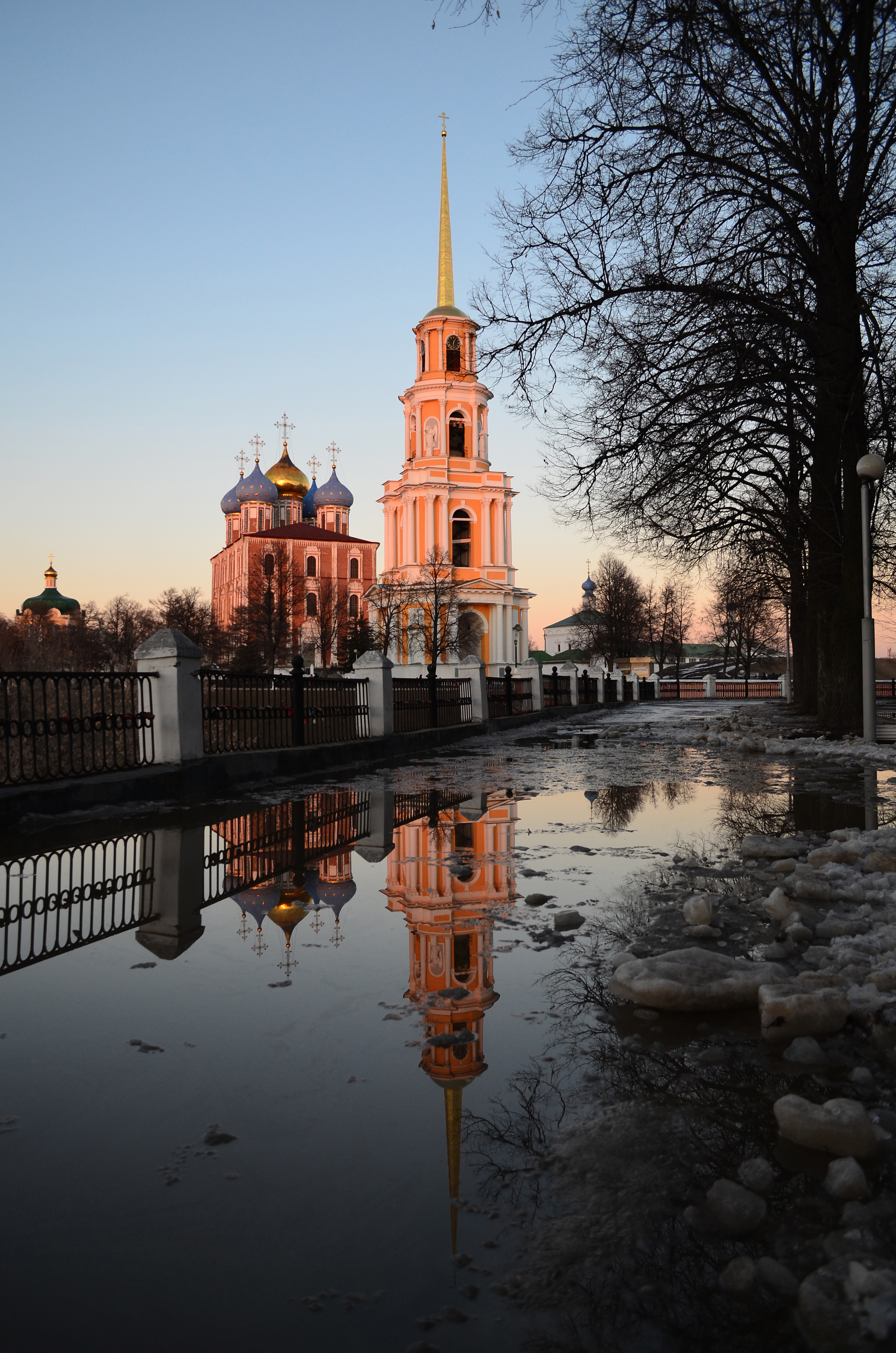 Колокольня Успенского собора Рязанского кремля.